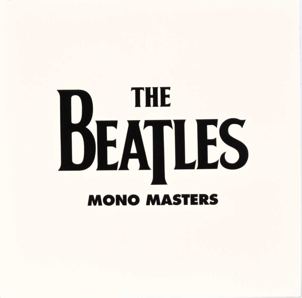 Album Cover Mono Masters